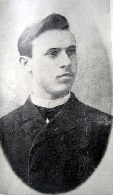 Олександр Кошиць, як студент Духовної Семінарії. Київ.